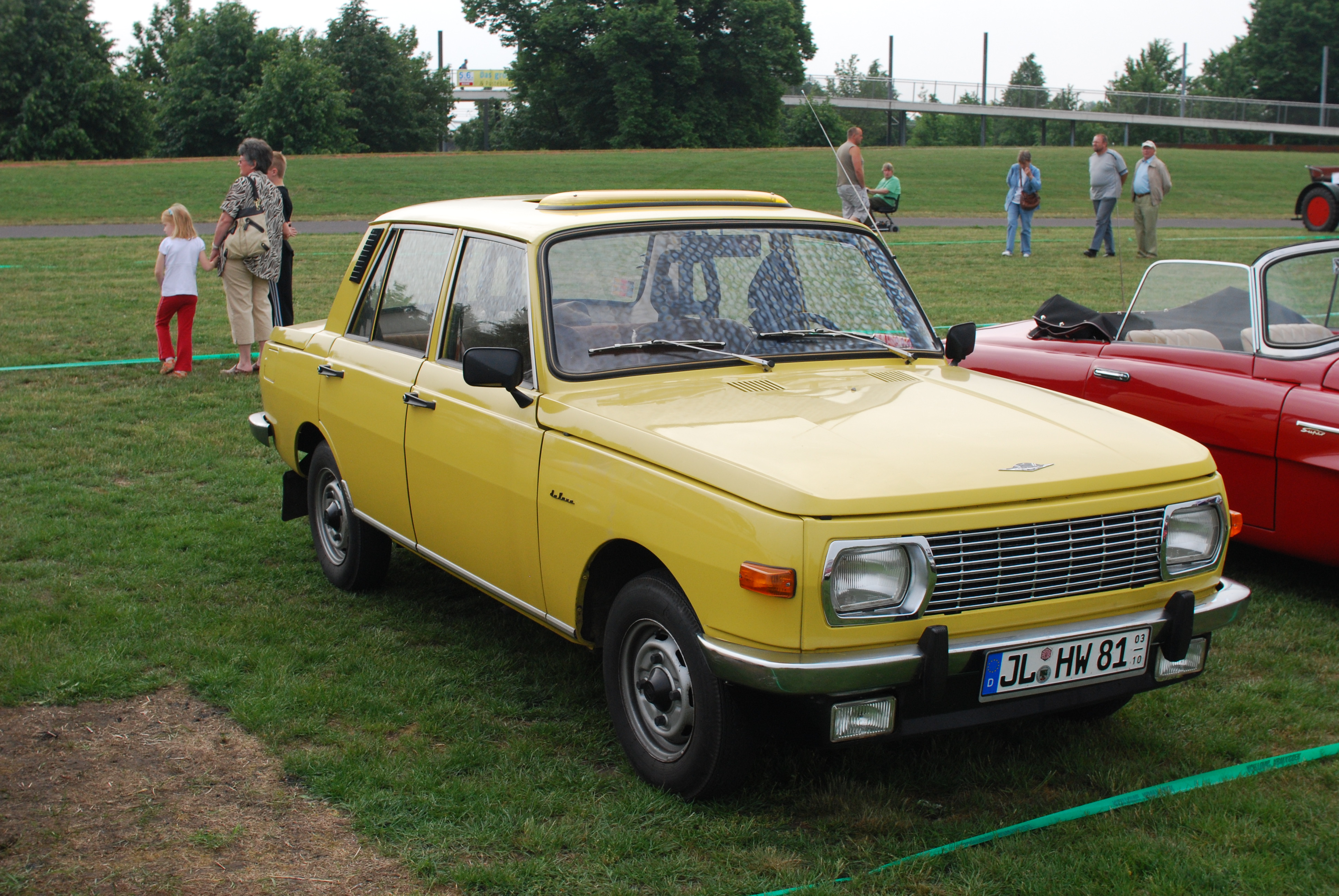 1. Magdeburger Oldtimertag am 21.05.2011 im Elbauenpark Magdeburg